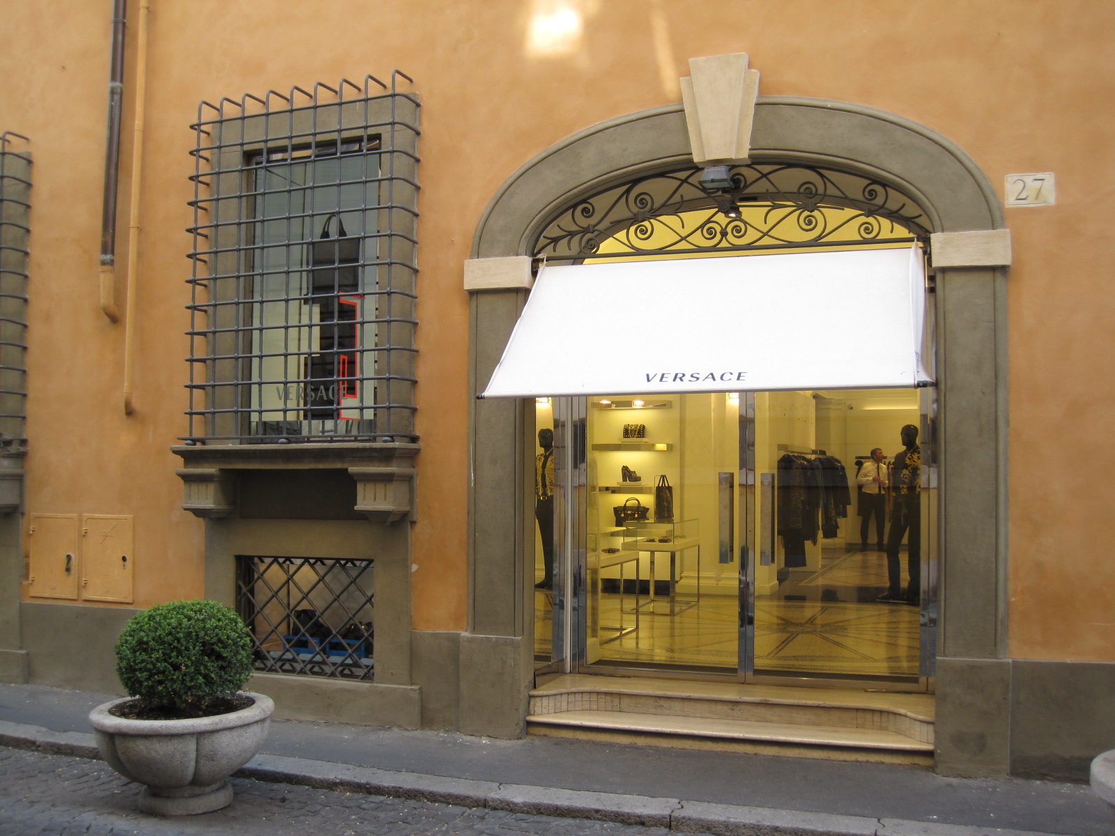 Boutique Vesace, via Bocca Di Leone à Rome